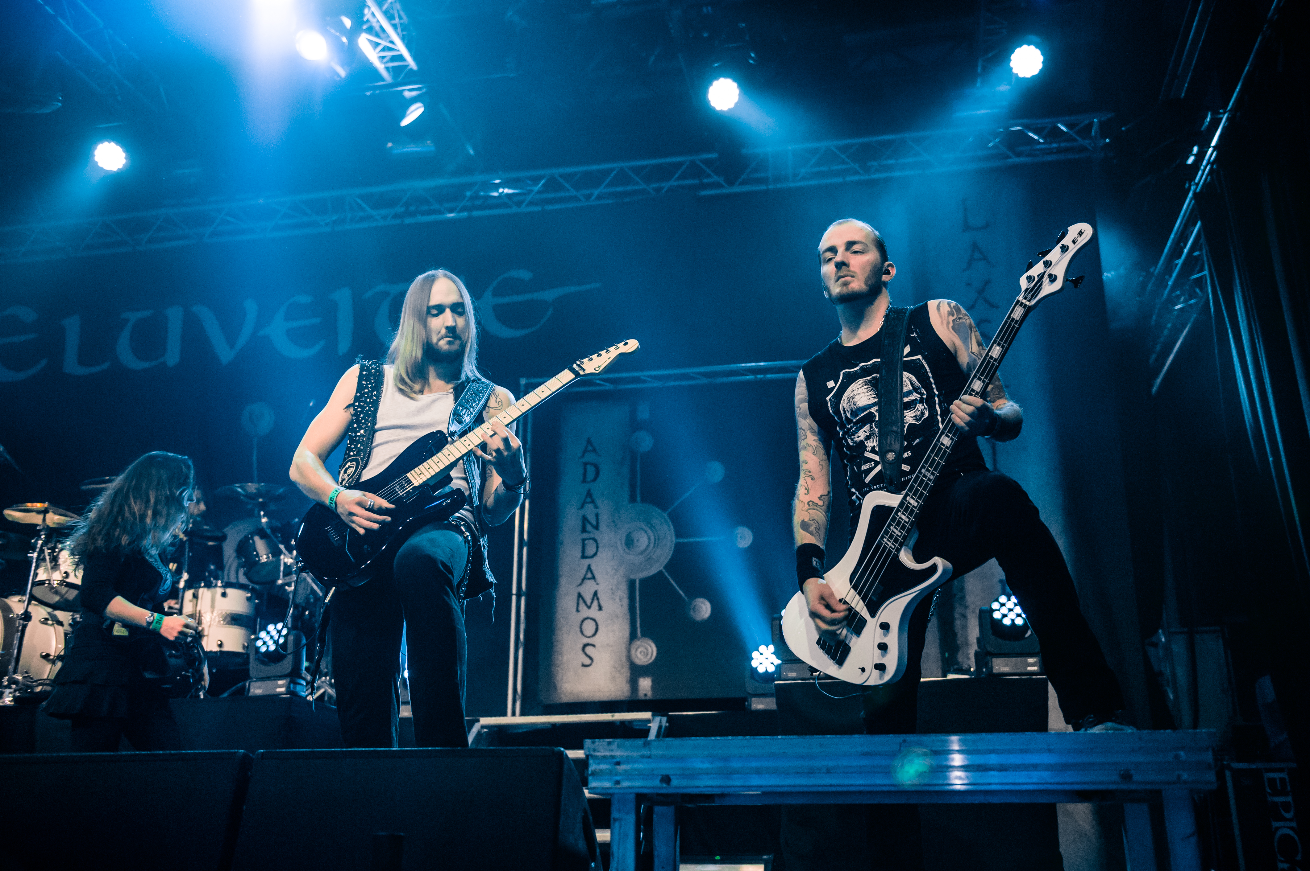 'Eluveitie - Epic Metal Fest - Eindhoven'